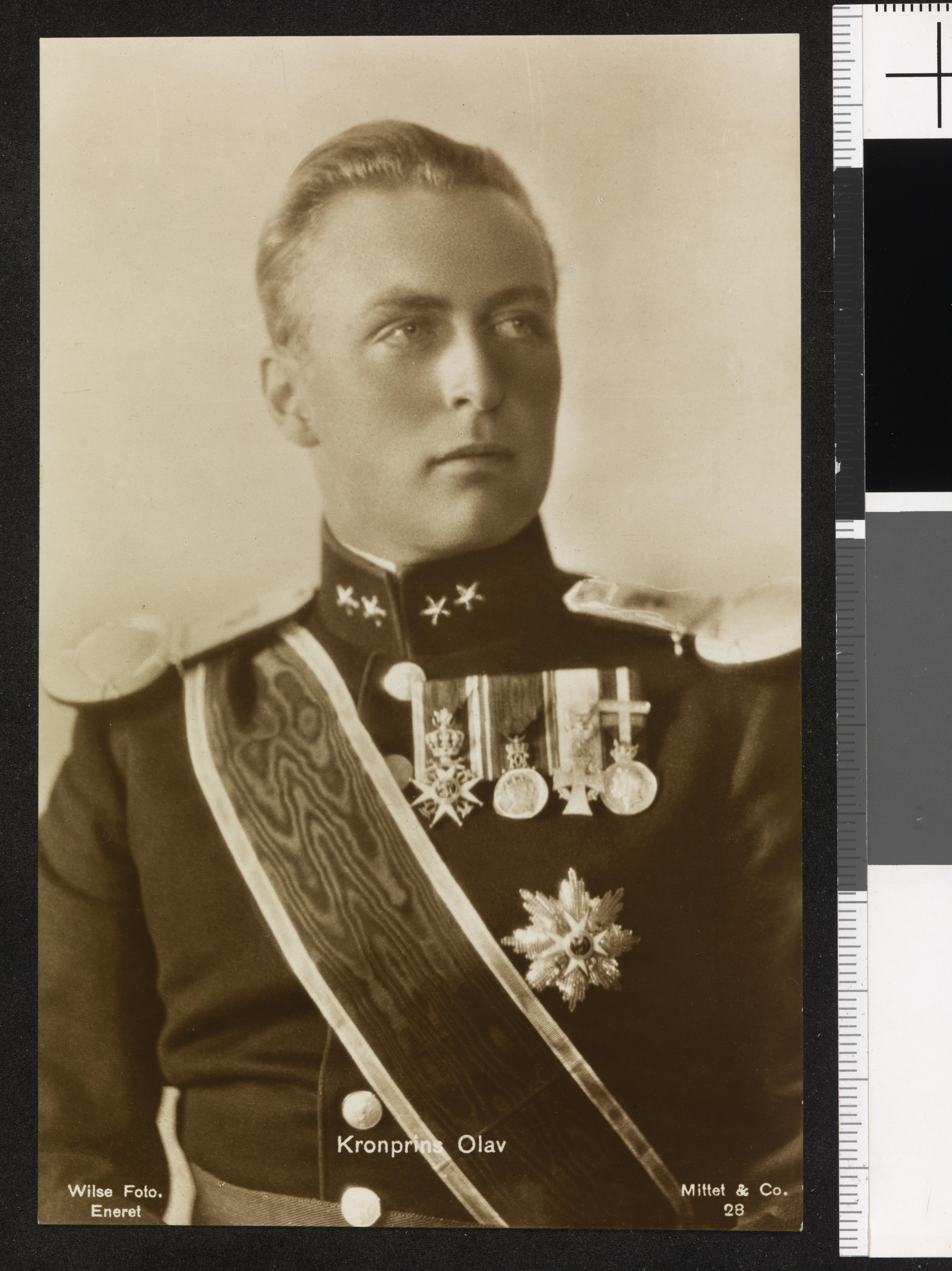 Bildet er hentet fra Nasjonalbibliotekets bildesamling Depicted person: Olav V konge av Norge